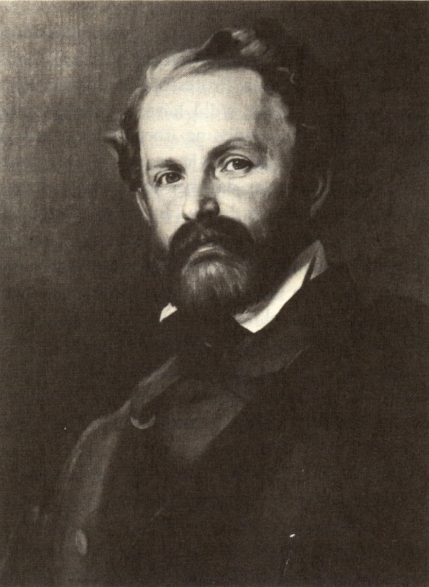 Karl Biedermann, Politiker, Publizist und Professor für Philosophie